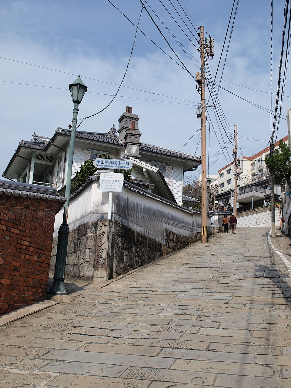 長崎市東山手にあるオランダ坂（2009年3月2日撮影）